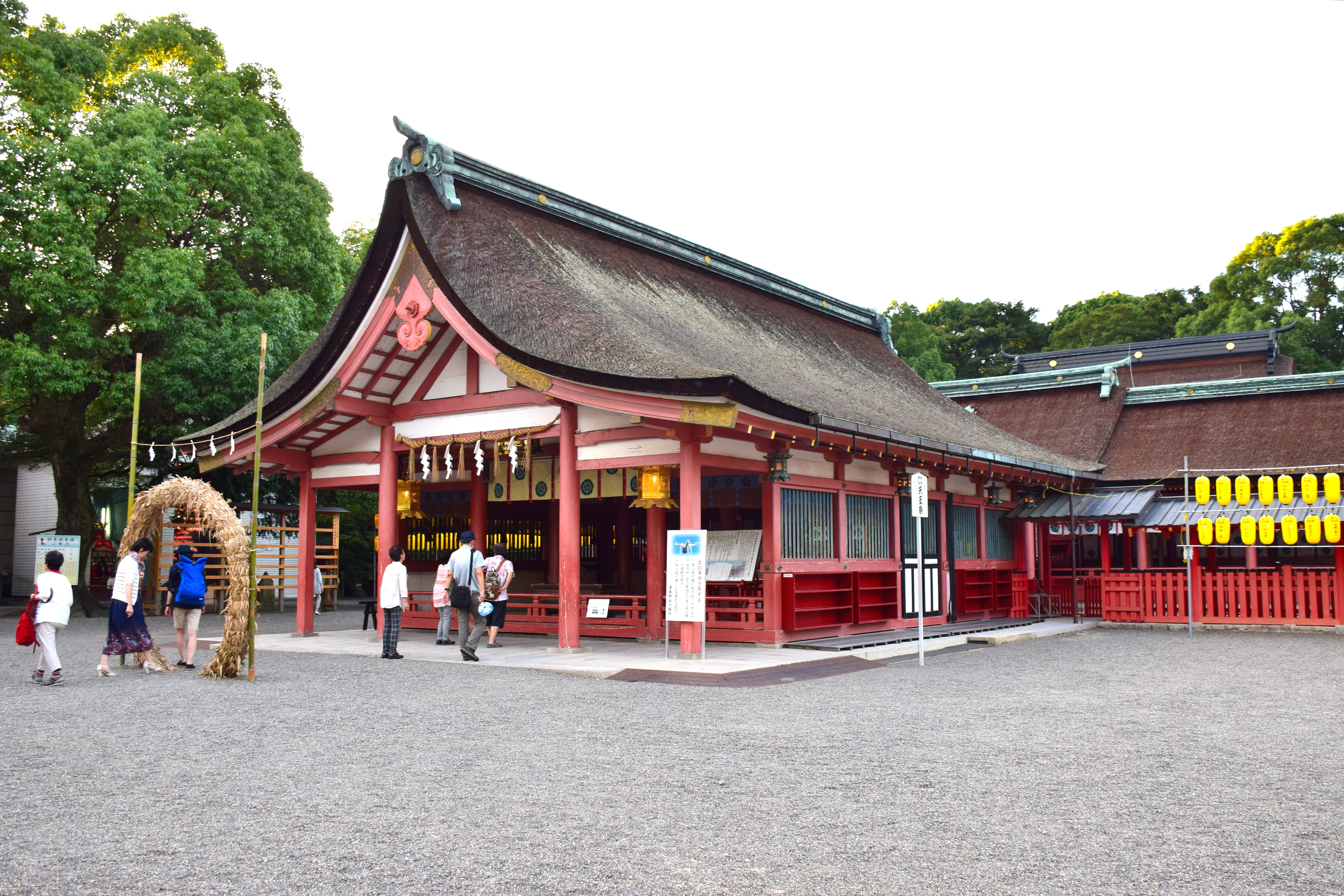 津島神社拝殿